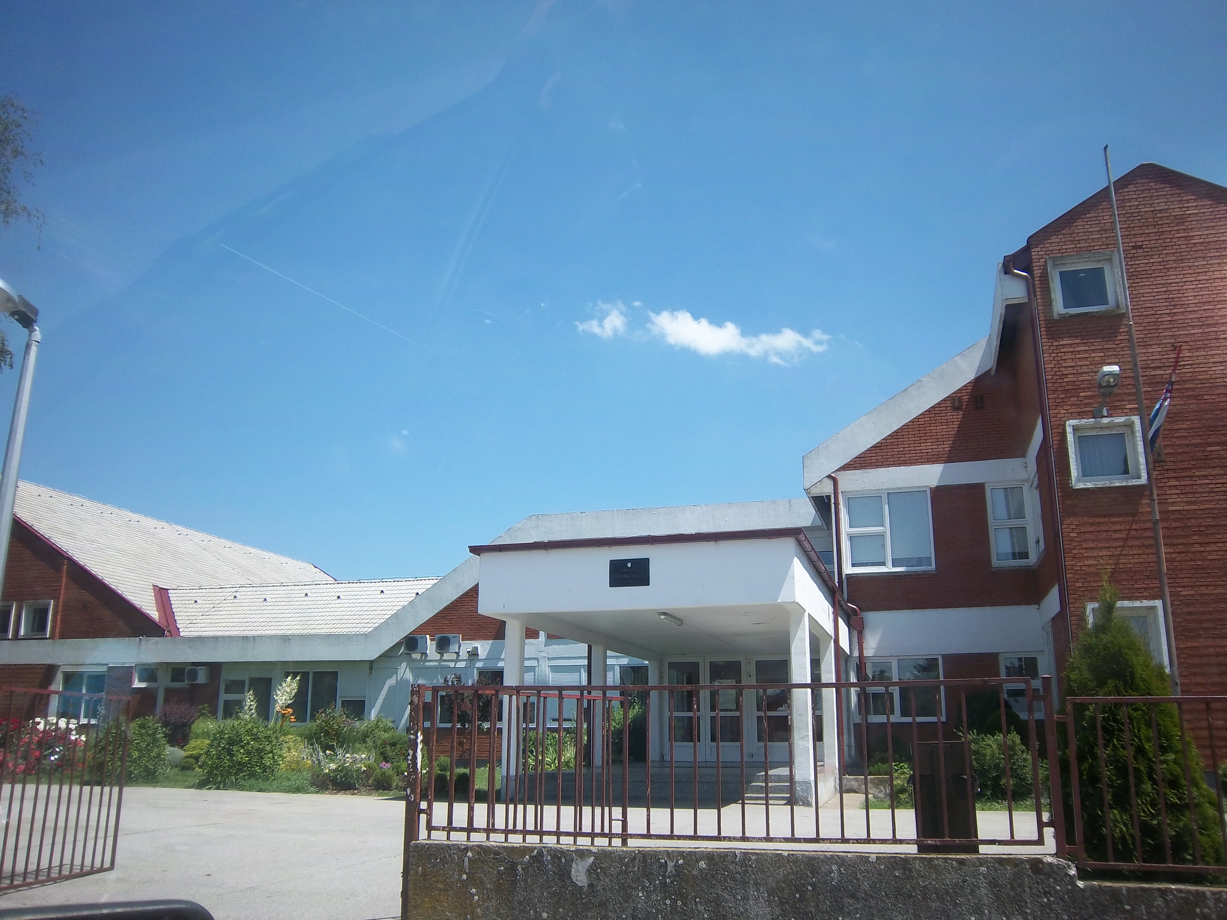 Srpskohrvatski / српскохрватски: Osnovna škola u Starim Jankovcima